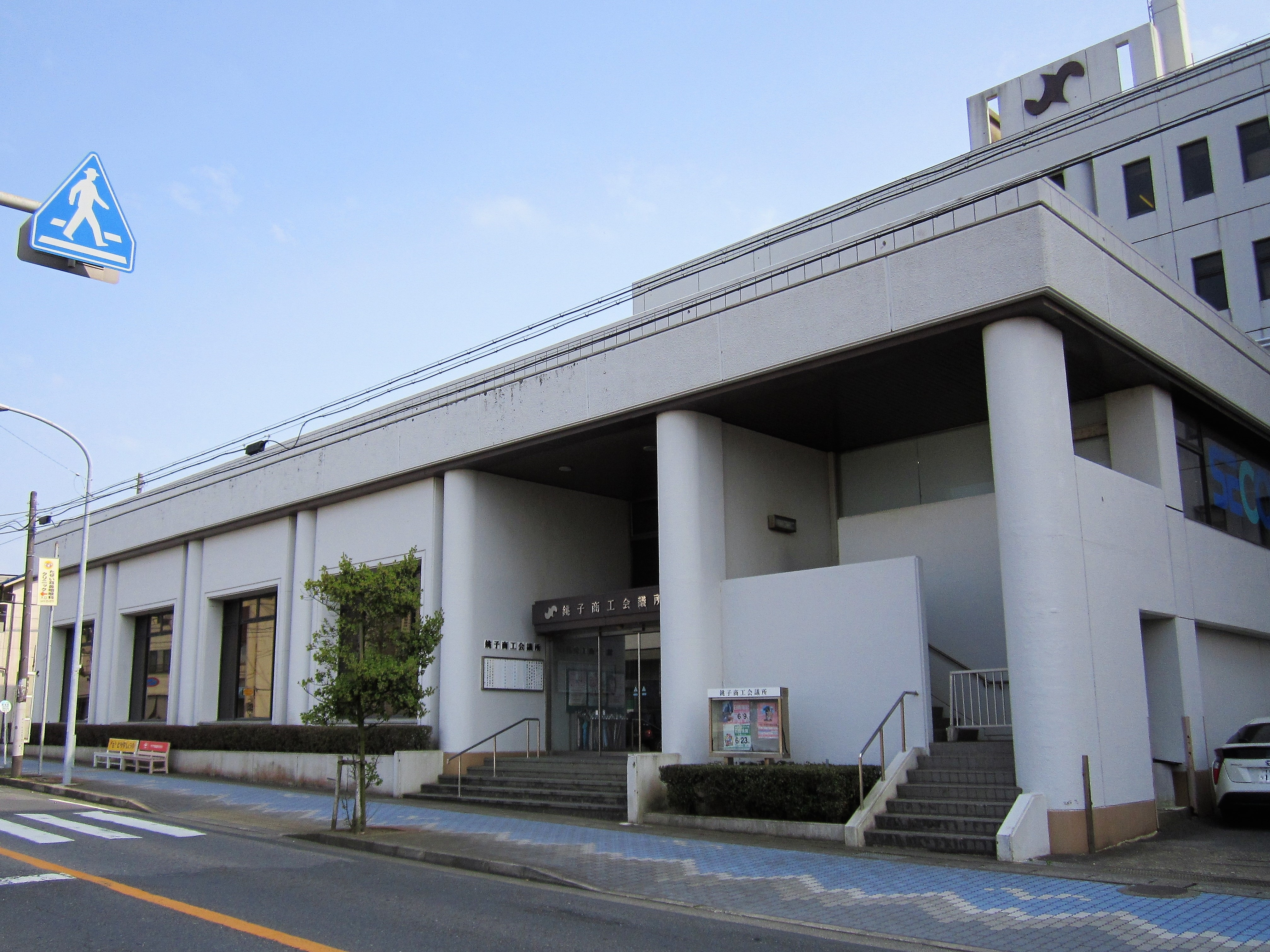 銚子商工会議所（銚子市三軒町） Canon PowerShot A2200